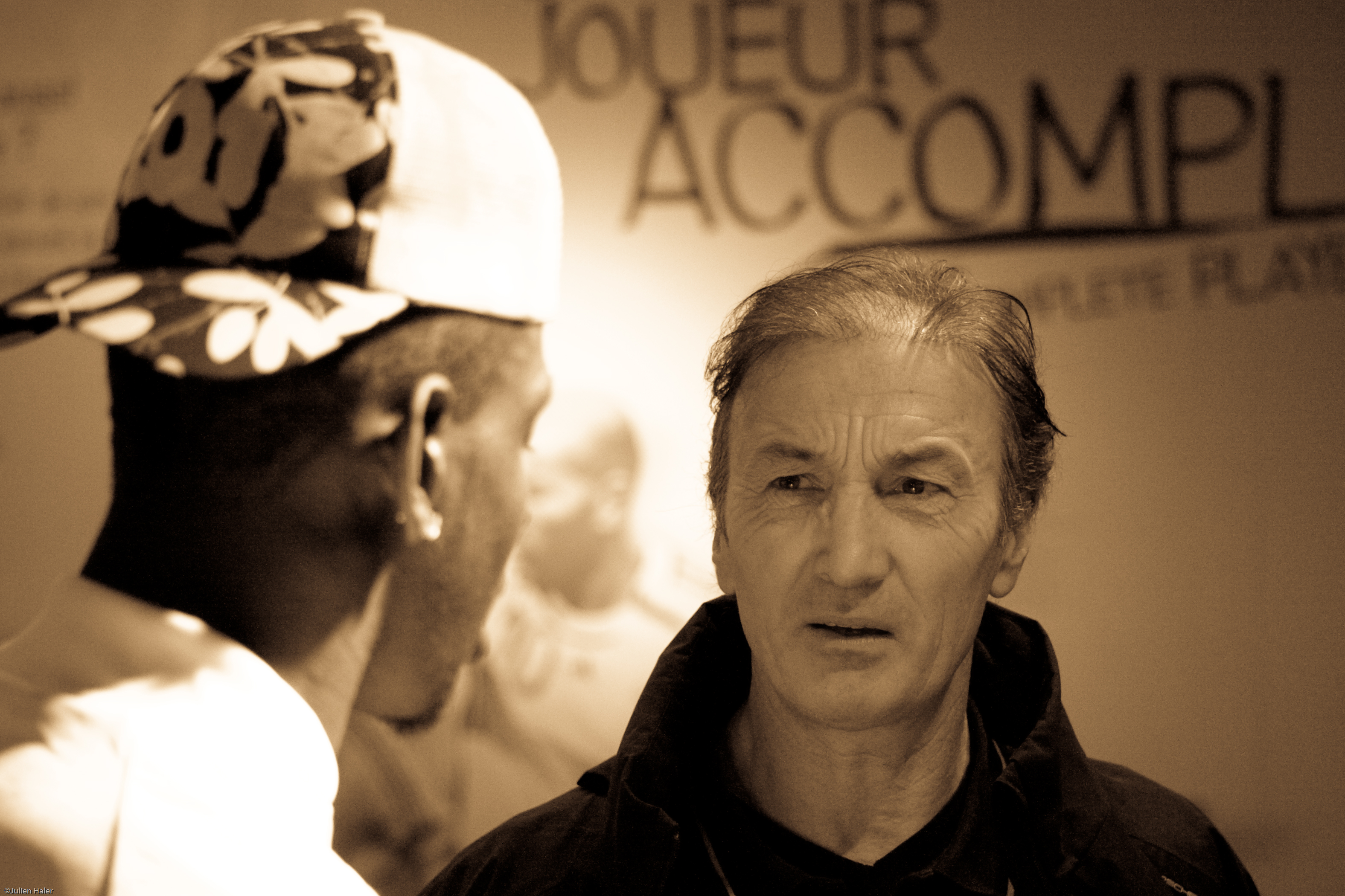 Erick Mombaerts lors d'un casting Adidas